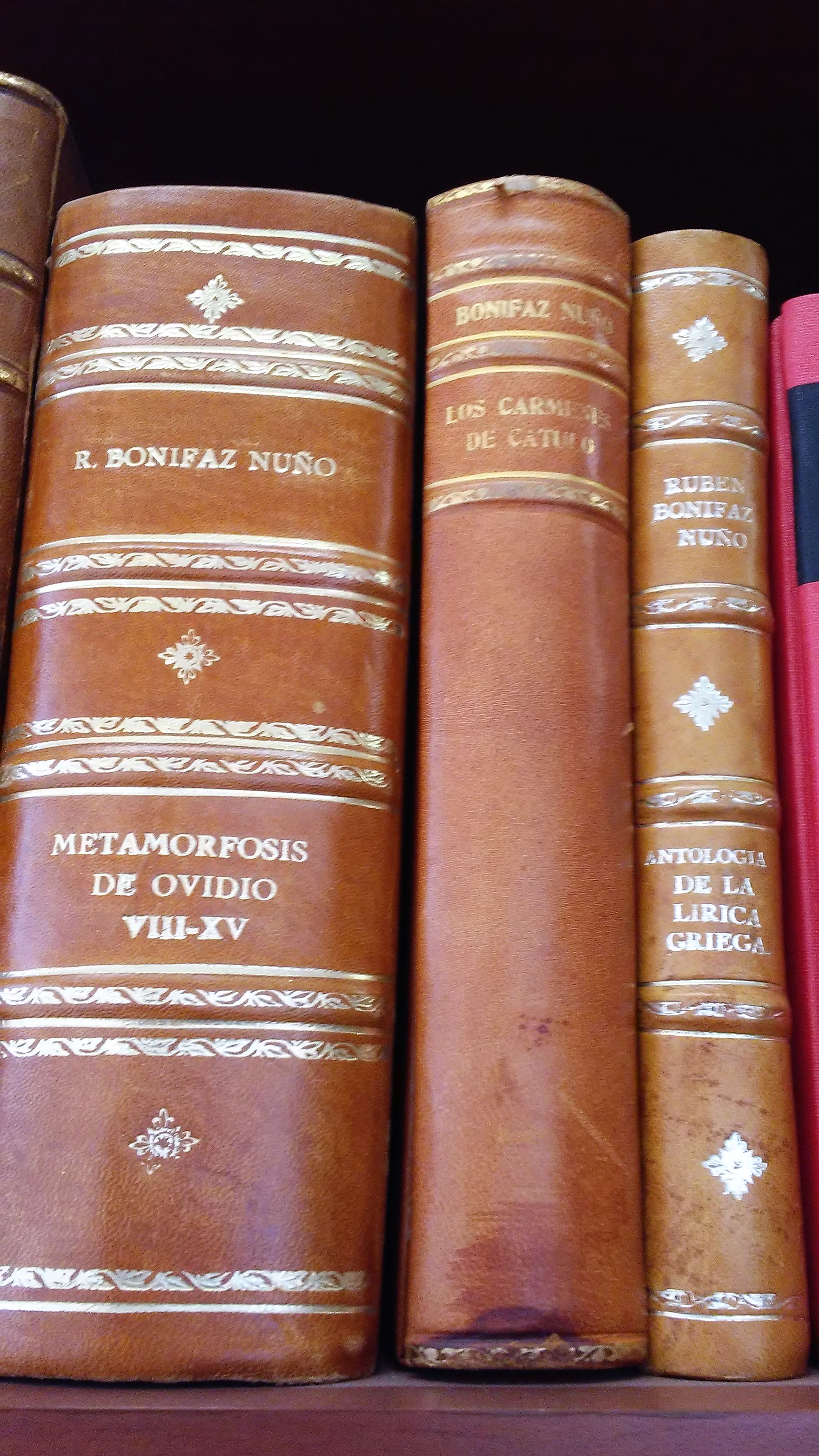 Libros clásicos traducidos por Rubén Bonifaz Nuño.